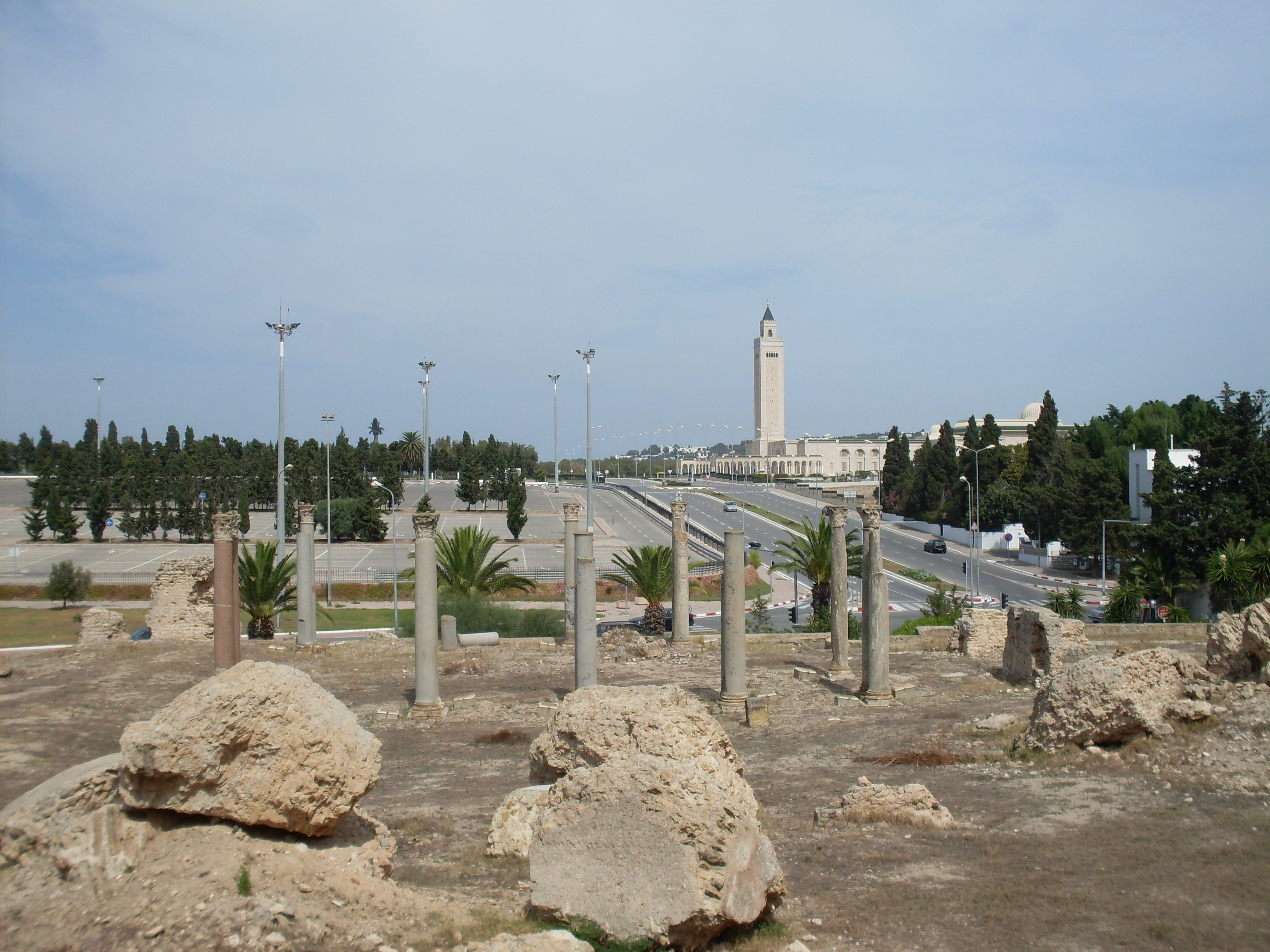 Tunisie, Monument des colonnes à Carthage